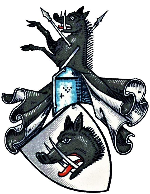 Wappen derer von Dönhoff